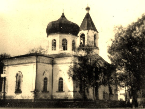 1860 г., разрушена немцами в годы Великой отечественной войны. Сейчас на ее месте располагается Мемориал